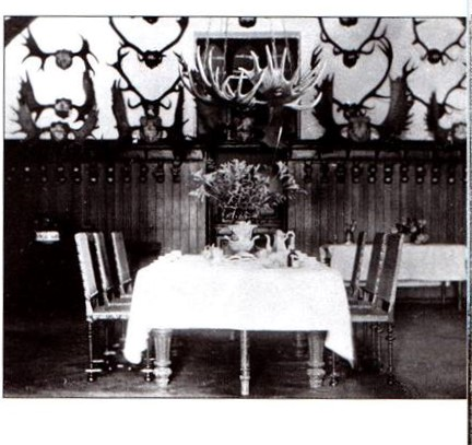 Ēdamzāle ap 1910.gadu.